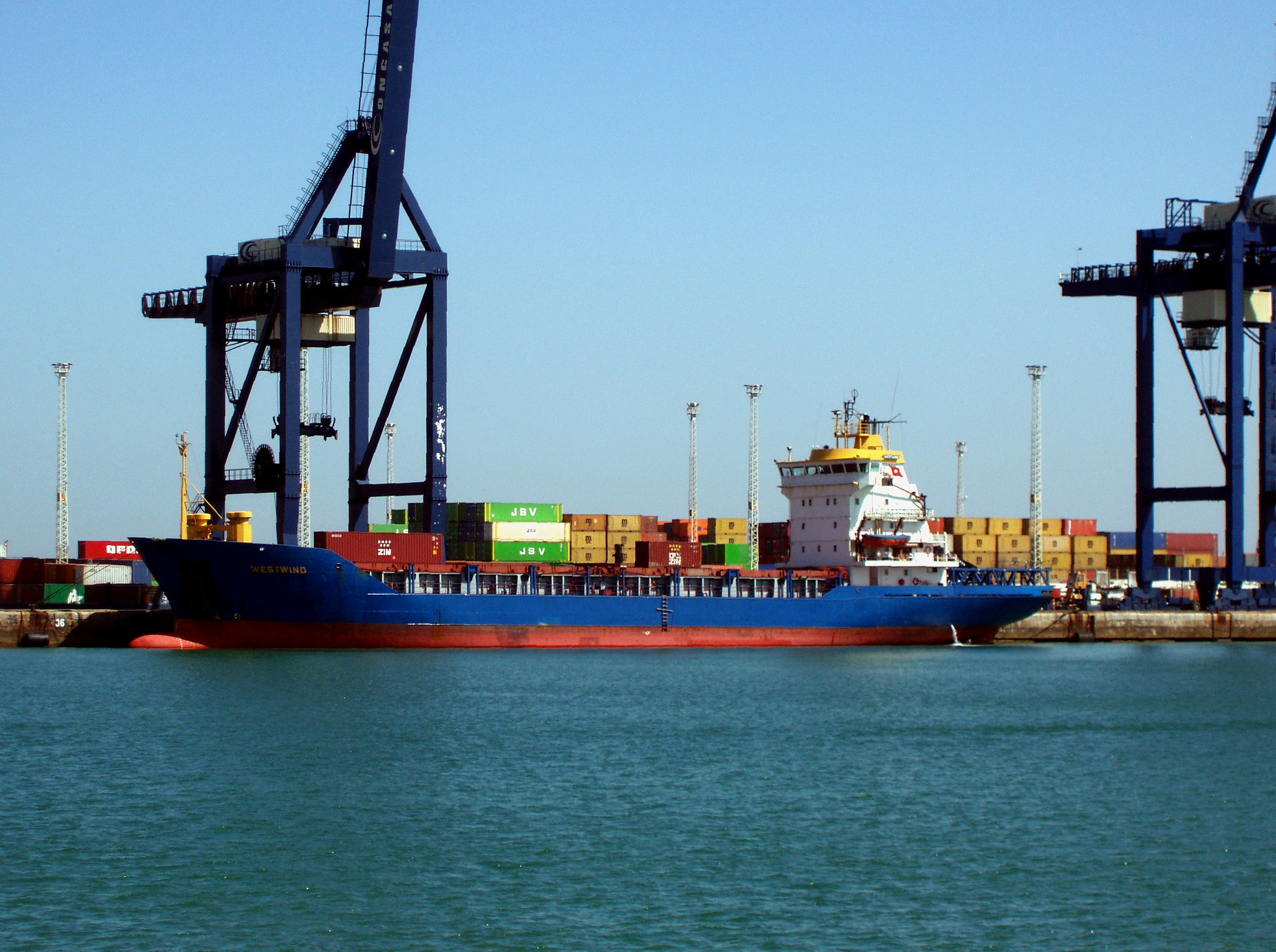 WESTWIND, bandera de Antigua y Barbuda, 101 m de eslora, en el Puerto de la Bahía de Cádiz IMO Number: 8515635 MMSI Number: 354599000 Callsign: 3EOA6 Length: 102 m Beam: 16 m